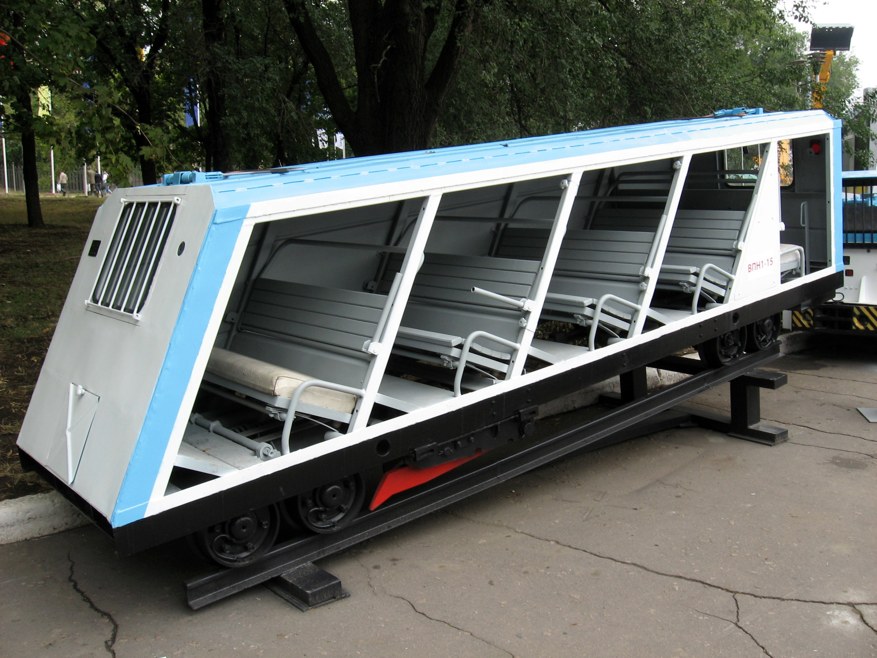 Фото з виставки Вугілля-Майнінг 2010